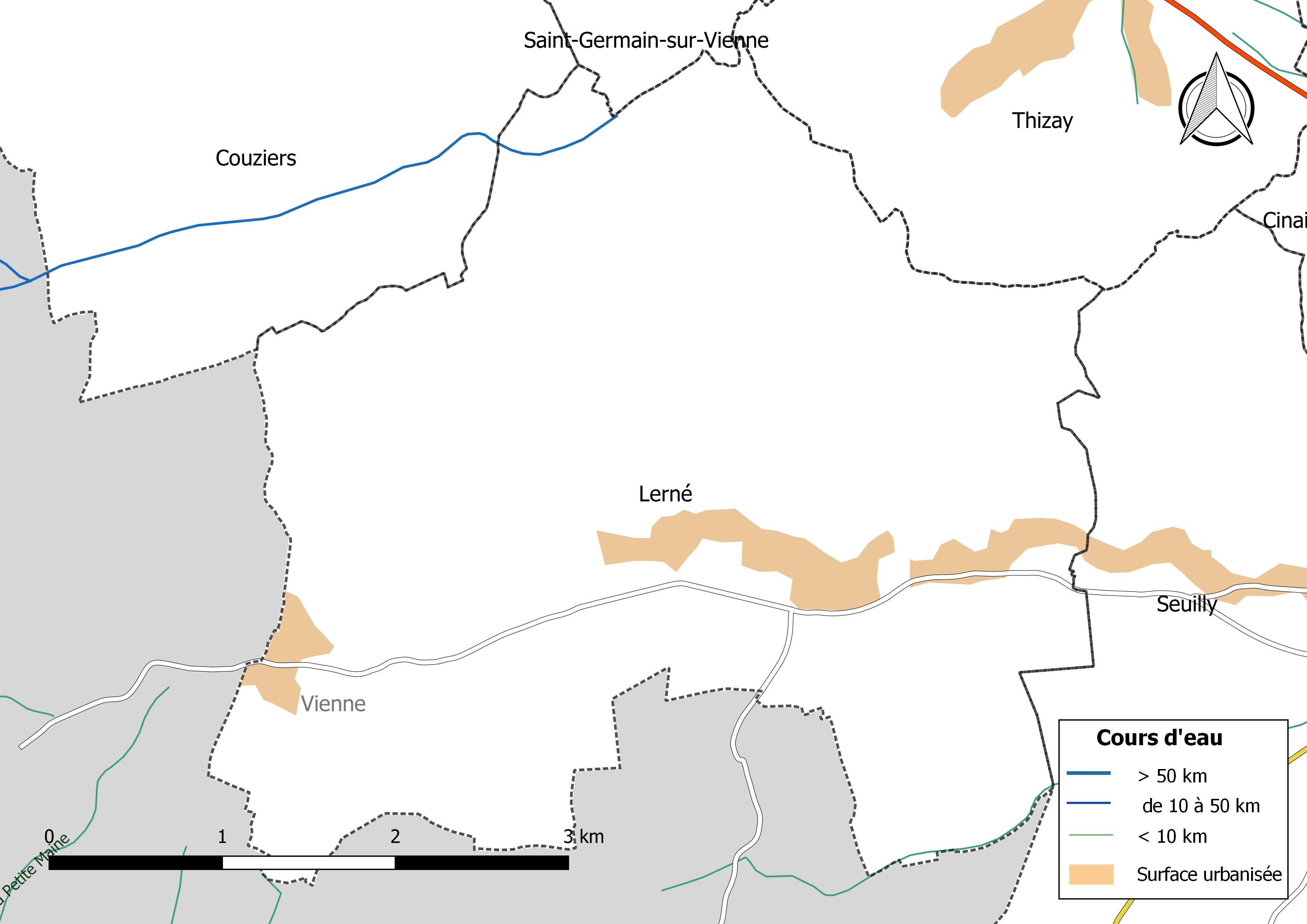 Carte du réseau hydrographique de la commune de Lerné (France).